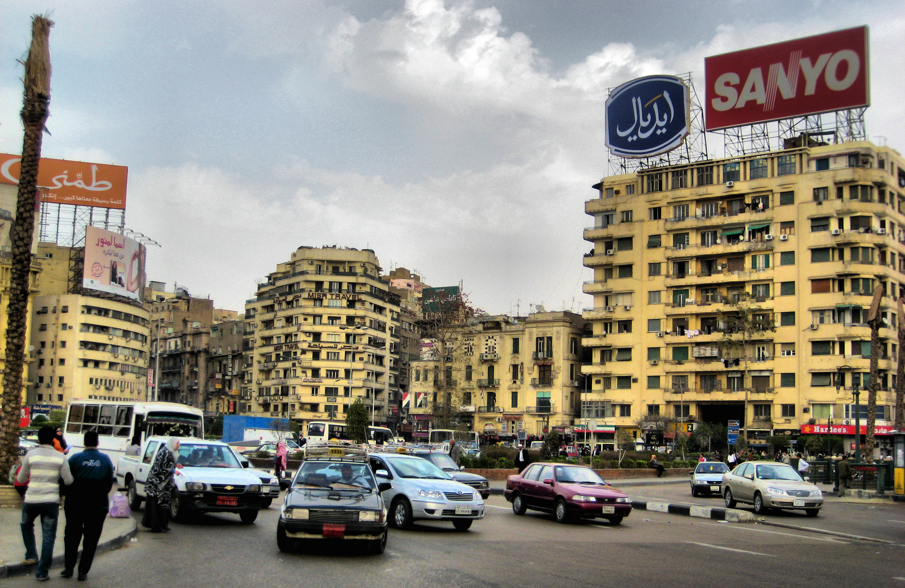 Midan Tahrir (Central Cairo)